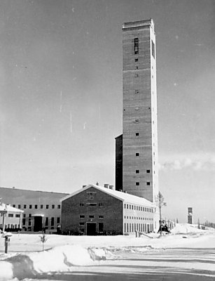 Vihannin kaivoksen kaivostorni talvella 1956.